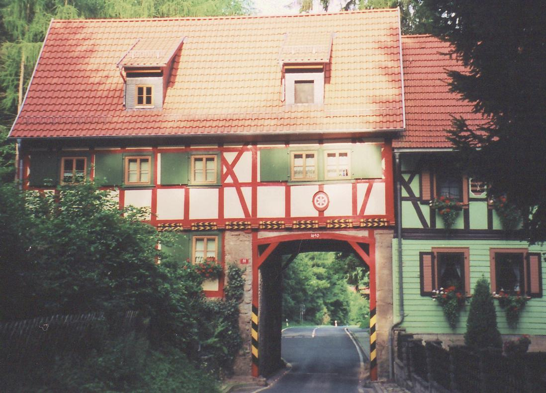 Das Grenzhaus bei Heyerode. Ein als Forsthaus errichtetes Fachwerkhaus aus dem 17. Jahrhundert mit Tordurchfahrt.